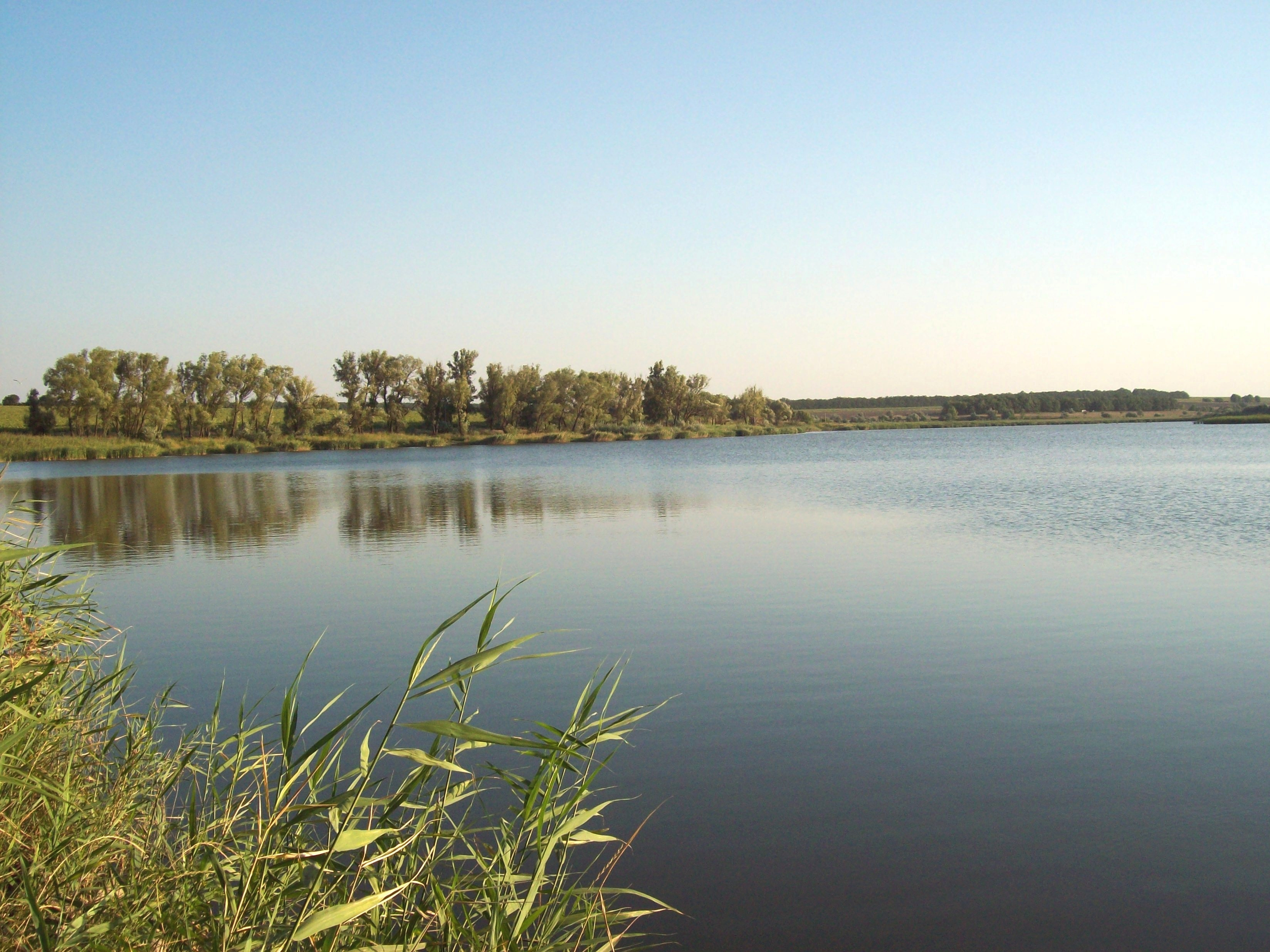 Ставок Червоний Маяк, Солонянський район, Дніпропетровська область. Серпень 2015 року.